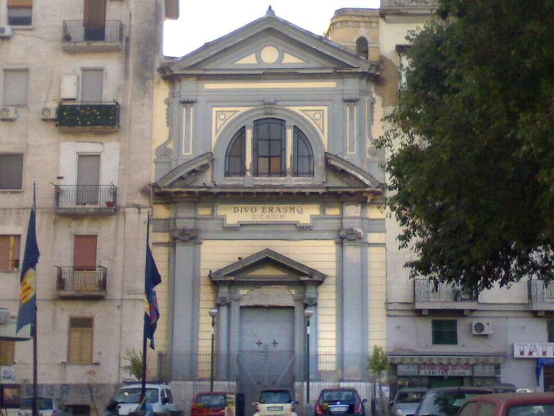 Chiesa di Sant'Erasmo ai Granili (Napoli)